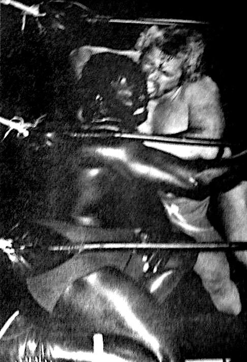 The Sheik dans l'almanach de catch Official Wrestling Yearbook n.3 de juin 1973.